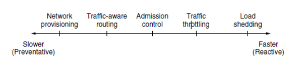 Şəkil 2. Yüklənmənin idarəedilməsinə yanaşmaların müddəti